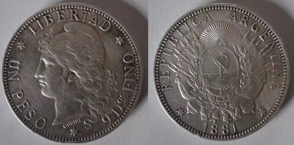 Moneda de 1 Peso (Patacón). Año 1881.